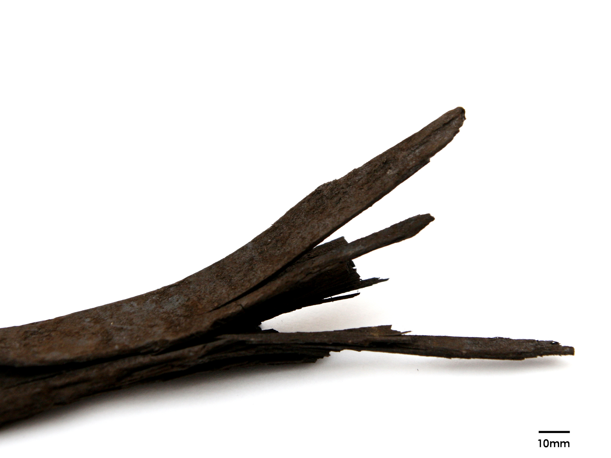 Fragment lignitu włóknistego.